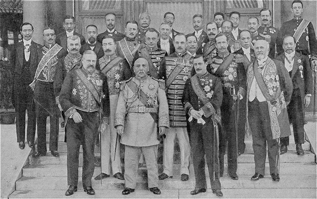 本照片系袁世凯于1913年10月10日正式就任中华民国大总统之后，各国驻华使节觐见合影。前排中者为袁世凯，三排右一为总统府秘书长梁士诒，右二为司法总长梁启超，后排右一为内务总长朱启钤。右四起为大理院长章宗祥、外交部参事顾维钧、外交部次长曹汝霖、大总统府外交顾问陆征祥、海军总长刘冠雄、参议院议长王家襄、教育总长汪大燮。章宗祥前左为侍从武官长廕昌，汪大燮前右为众议院议长汤化龙。.